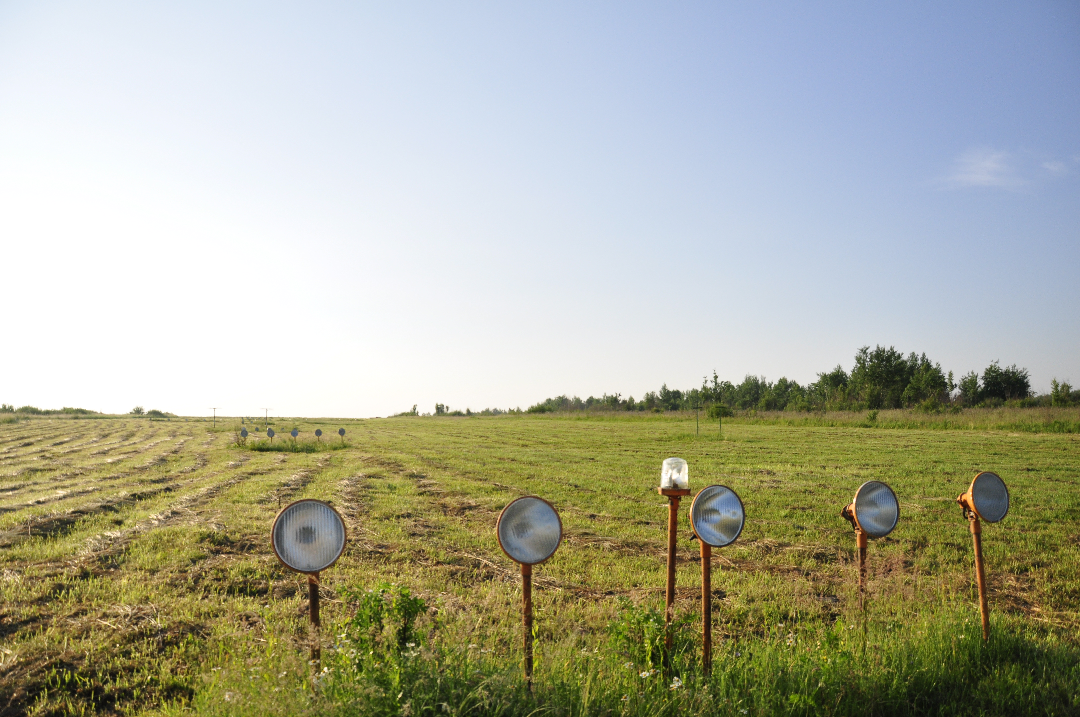 Елементи світлосигнального обладнання в Івано-Франківську